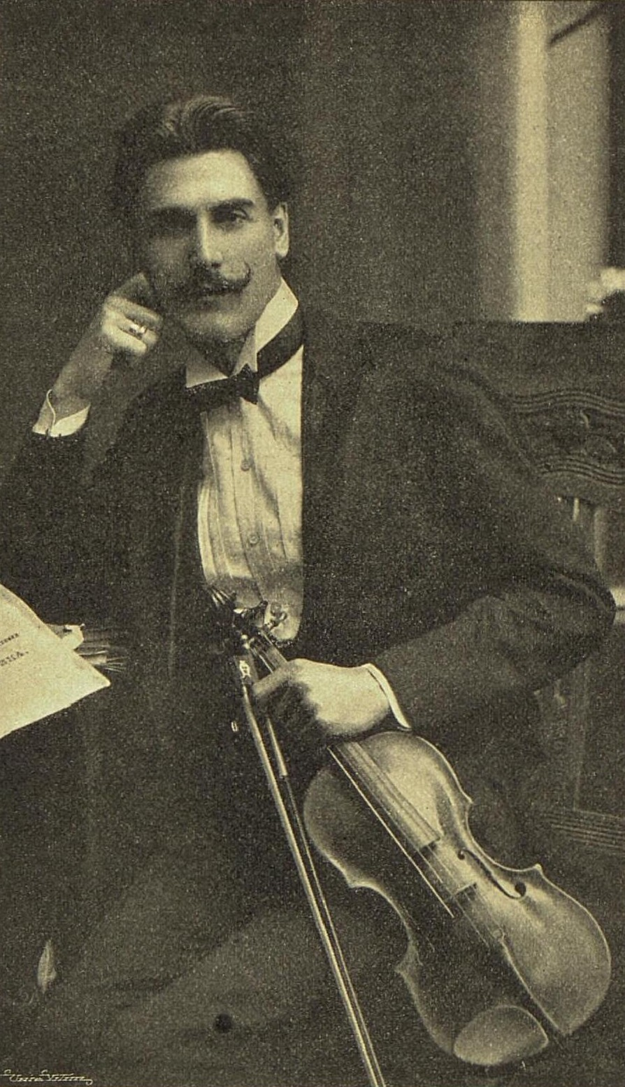 Jindřich Bastař, český houslista a hudební pedagog.